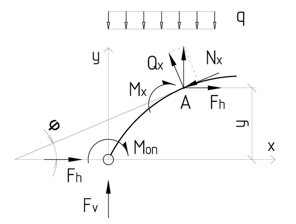 Схема определения усилий в арке